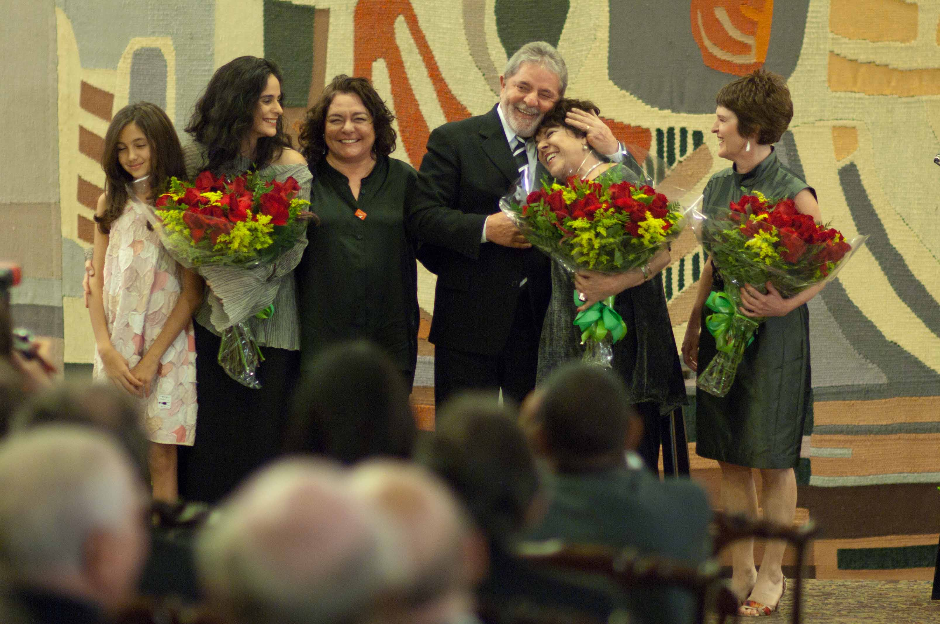 Presidente Lula com a Família de Vinícius de Moraes. Maria Luiza de Moraes Amaral (bisneta) Mariana de Moraes (neta) Luciana de Moraes (filha) Luiz Inácio Lula da Silva (presidente da República) Miúcha (cantora) Georgiana de Moraes (filha) Foto: Pedro França/MinC